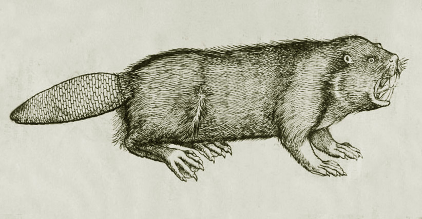 Gravure d'un castor, in chap. "Quadrup Ferorum (quadrupèdes sauvages), p 84, in Historiae animalium (Zürich, 1551) par Conrad Gessner (1516-1565). Il existe aussi des version colorées (aquarellée) de cette gravure.